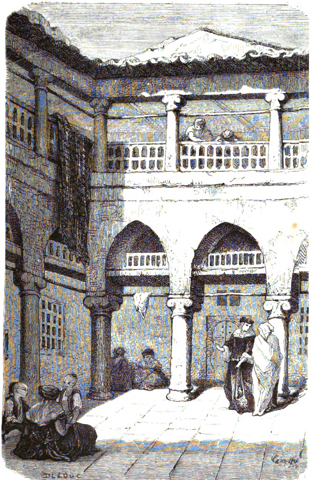 Cour de la Kalaa Beni Abbès